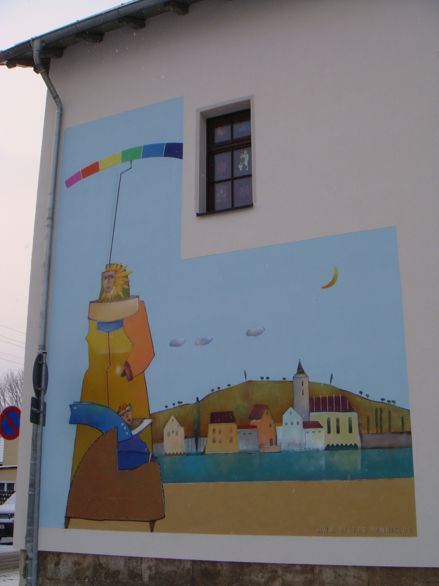 Wandbild am Kindergarten, entstanden 2009